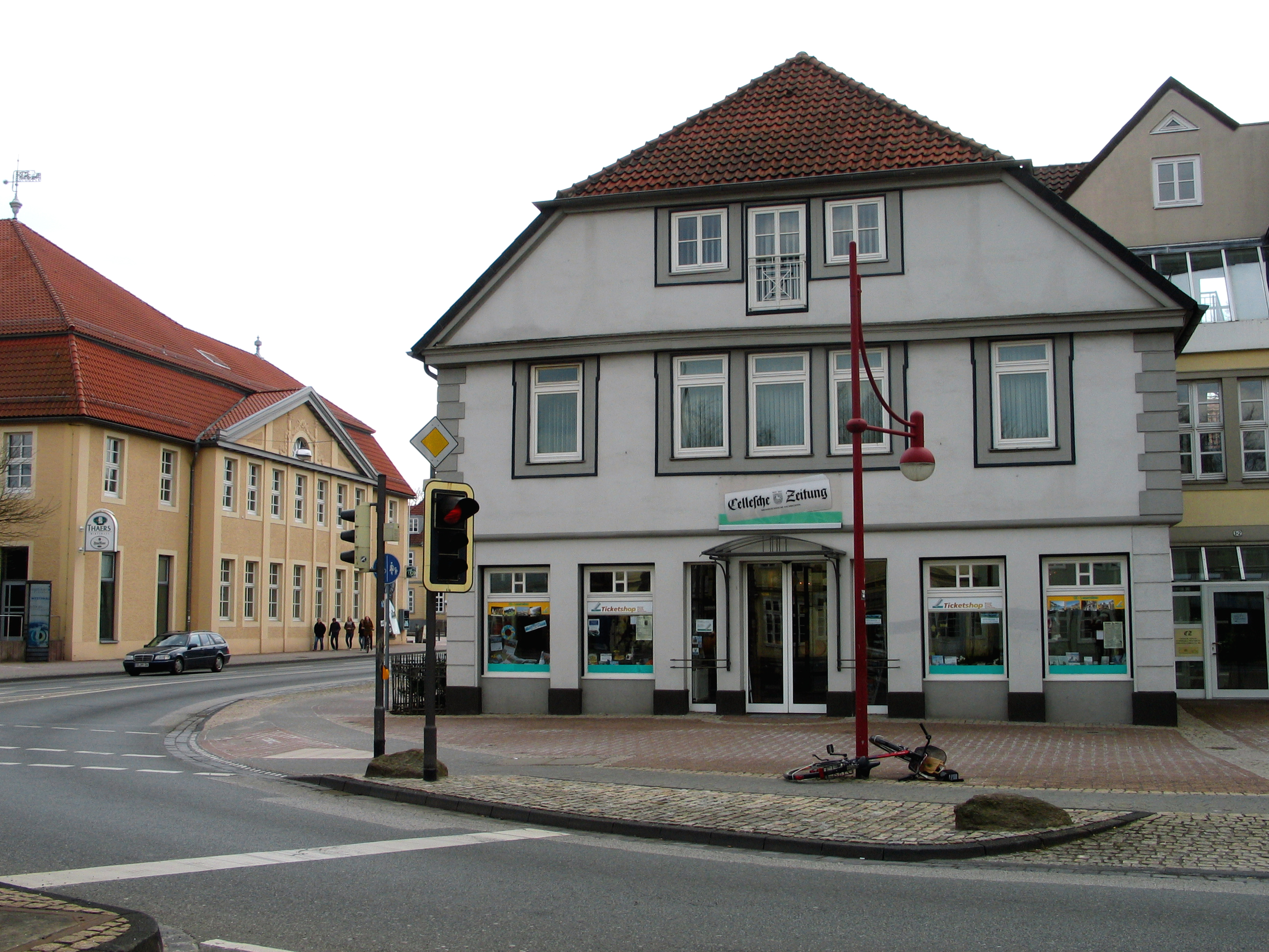 Eines von mehreren Gebäuden der Celleschen Zeitung, hier in der Bahnhofstraße 1-3, Ecke Hannoversche Straße in Celle ...